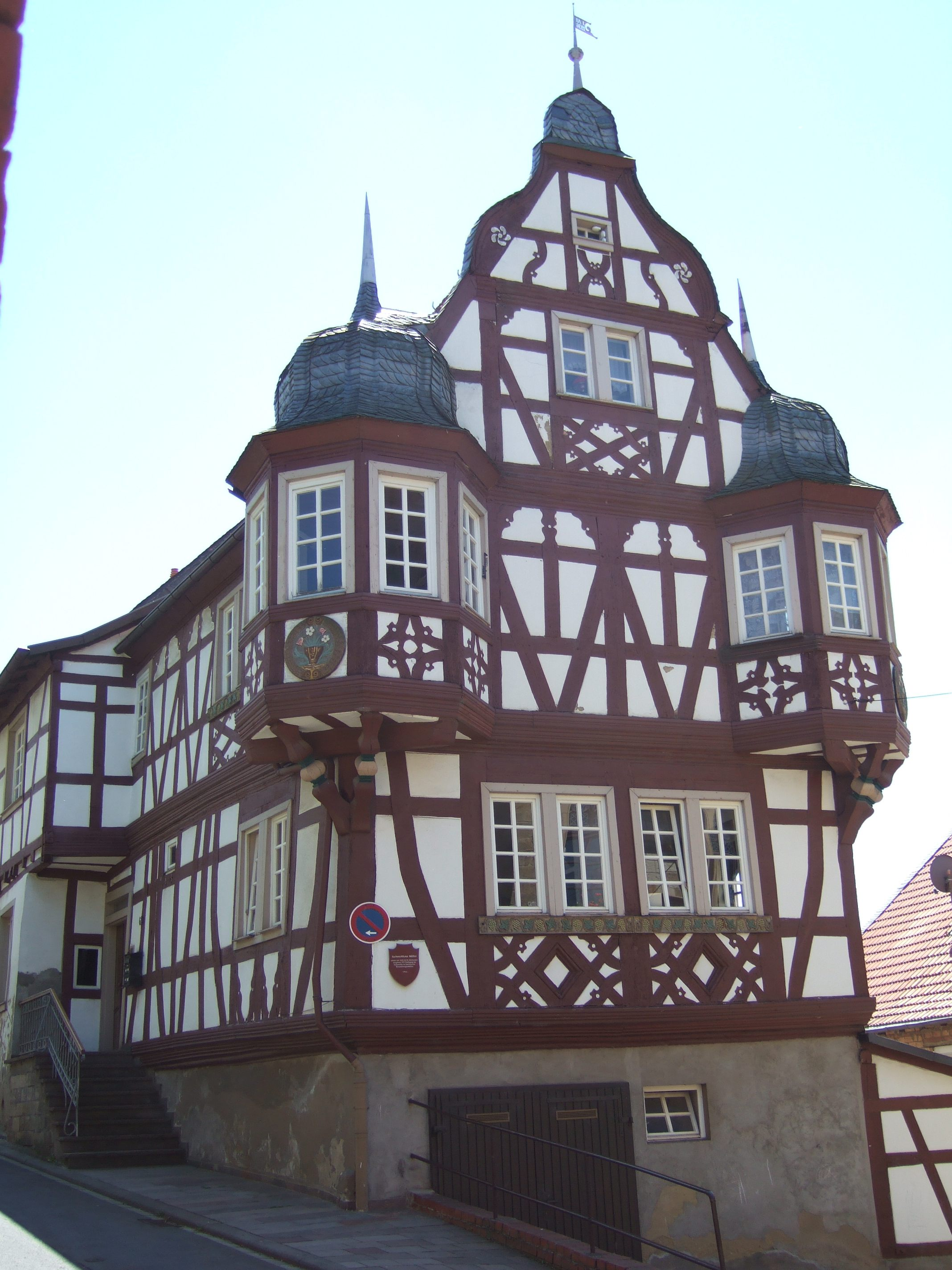 Haus Müller, Monzingen